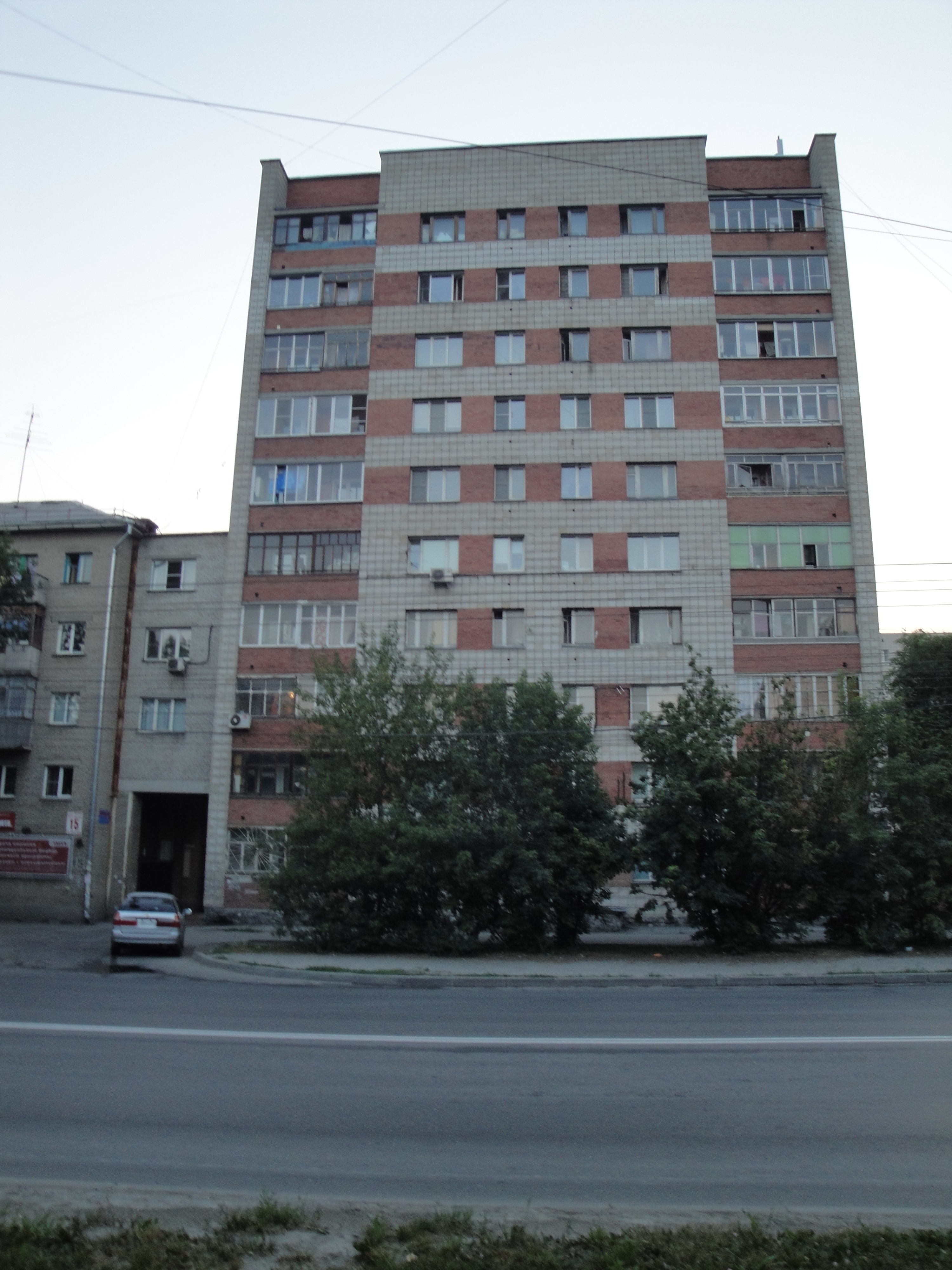 Стандартный кирпичный дом по Ватутина, нечётная сторона